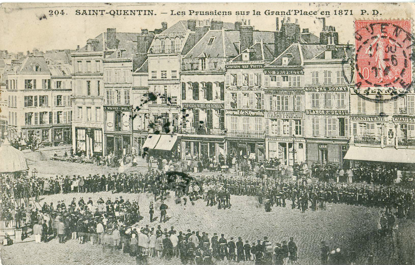 Carte postale ancienne éditée par PD, n°204 :st-Quentin - Les Prussiens sur la Grand'Place